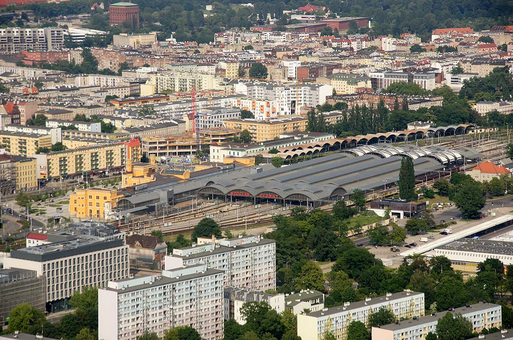 Panorama Wrocławia z wieży Sky Tower